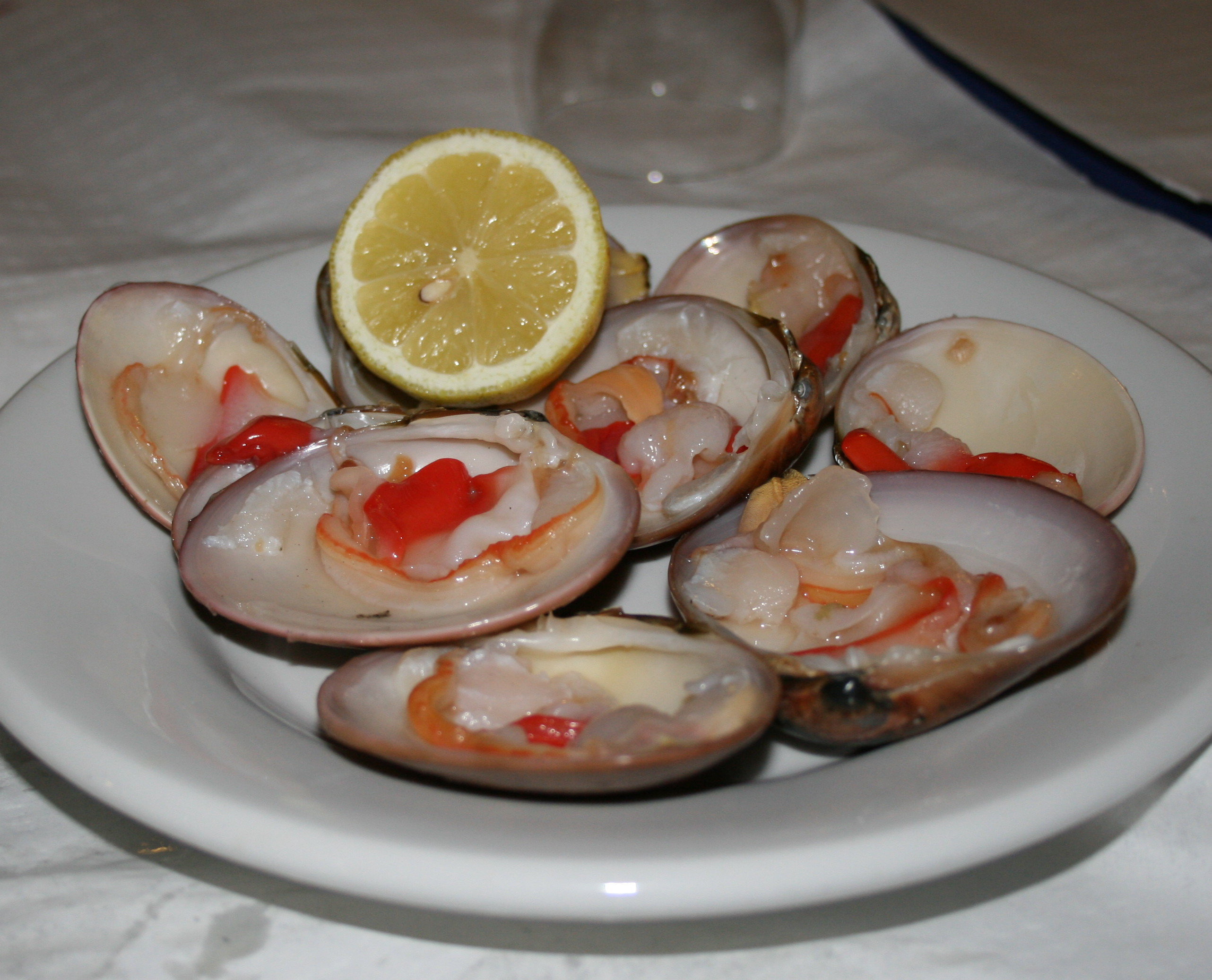 Moluscos, Conchas finas (Callista chione) - Servidos en "El Tintero" (Málaga) - malagueñas